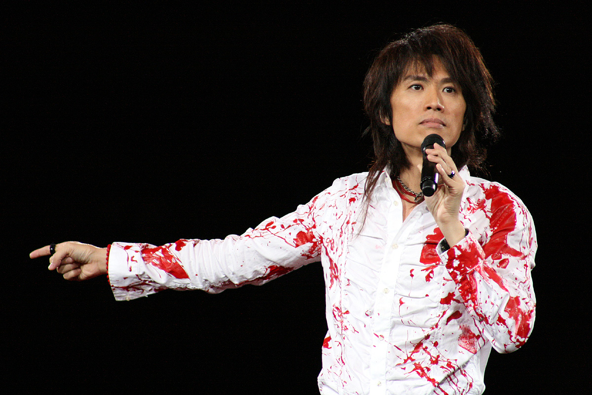 2010黃子華楝篤笑20年娛樂圈血肉史II